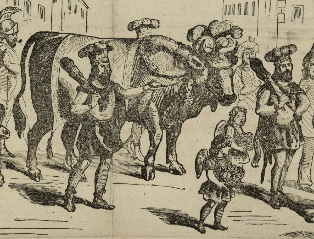 Détail de la gravure illustrant le programme. On y voit le Bœuf Gras et les deux sacrificateurs déguisés en sauvages qui l'accompagnent.